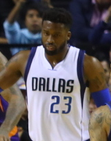 Partido NBA